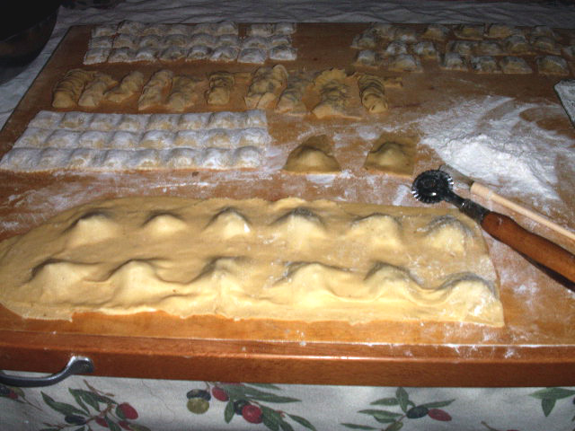 Pansoti